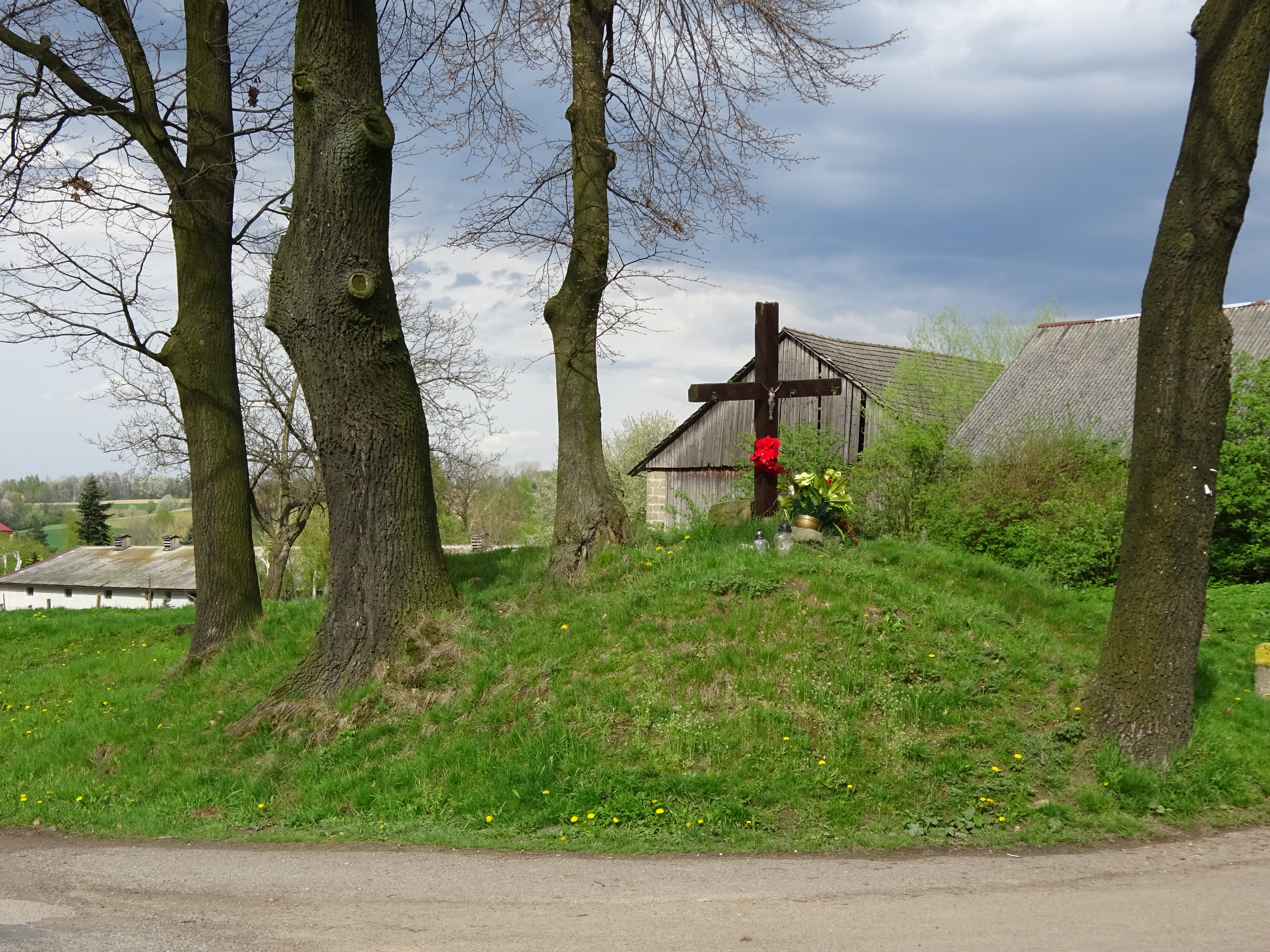 Tajemniczy kopiec w Liplasie, wsi w Gminie Gdów. 2016